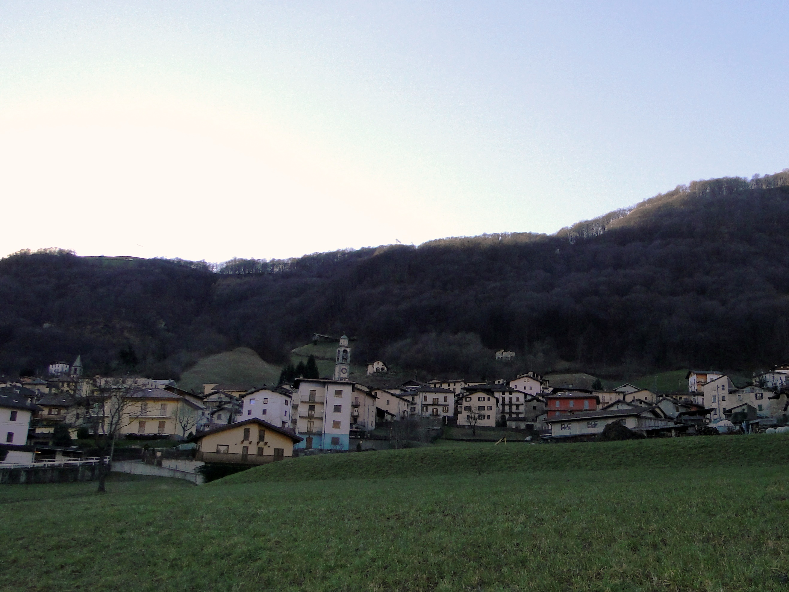 Vista di Pasturo (LC). Italy